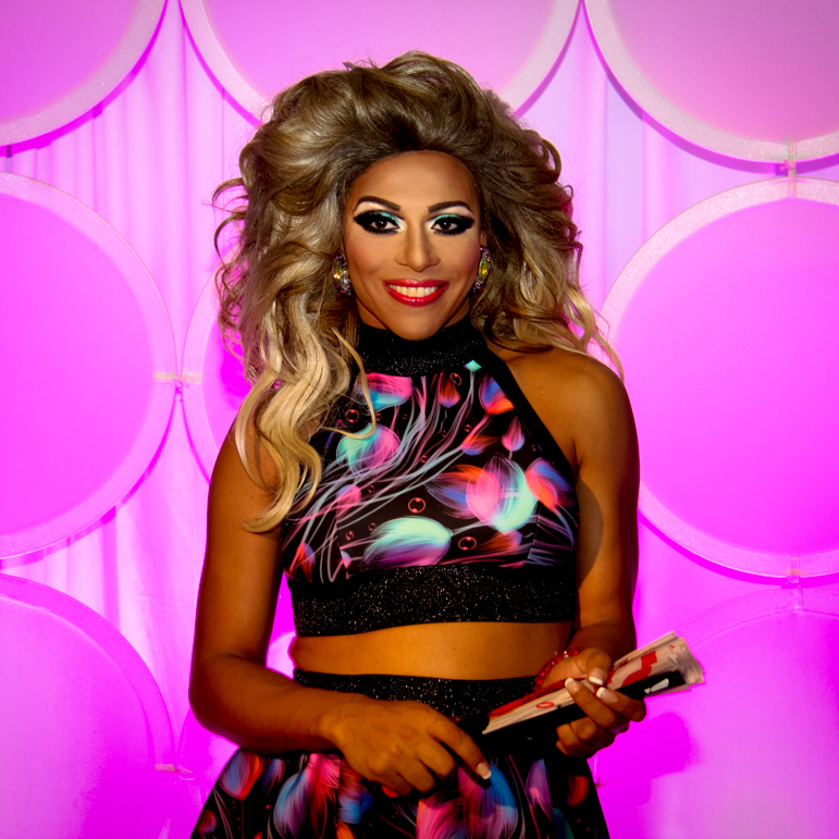 Shangela